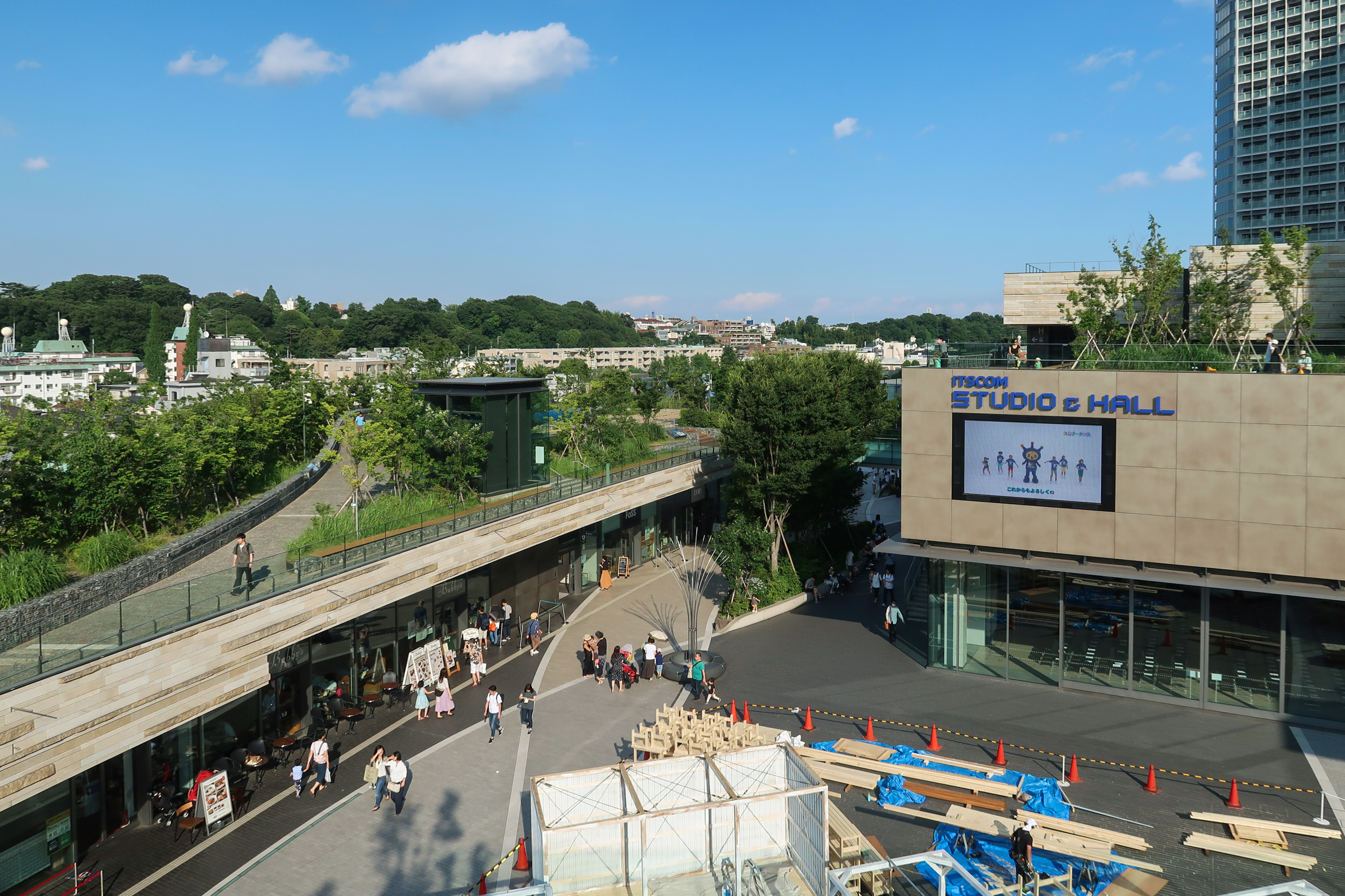 Futako-Tamagawa Rise Shopping Center